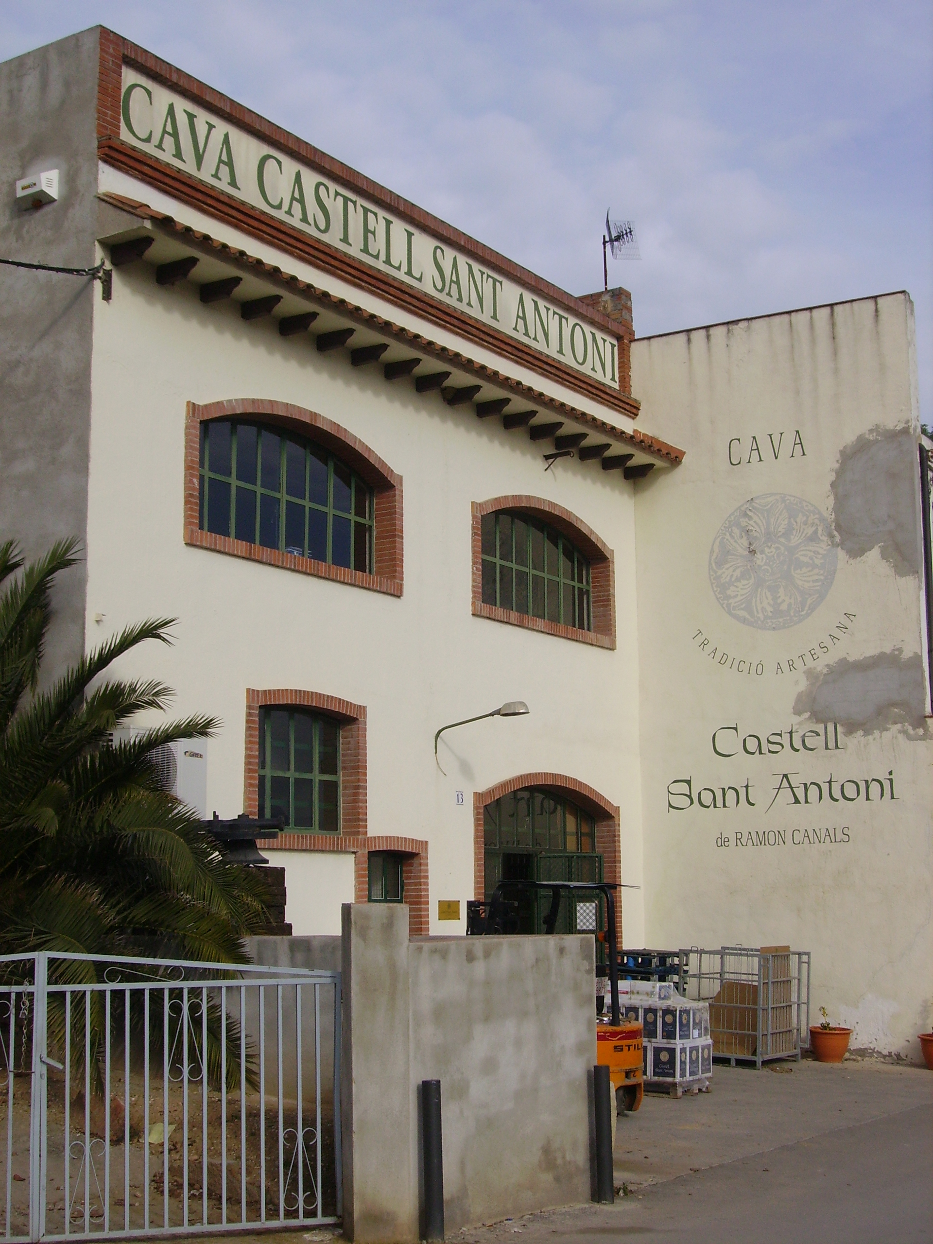 Caves Castell Sant Antoni a Sant Sadurní d'Anoia, Alt Penedès, Catalunya.